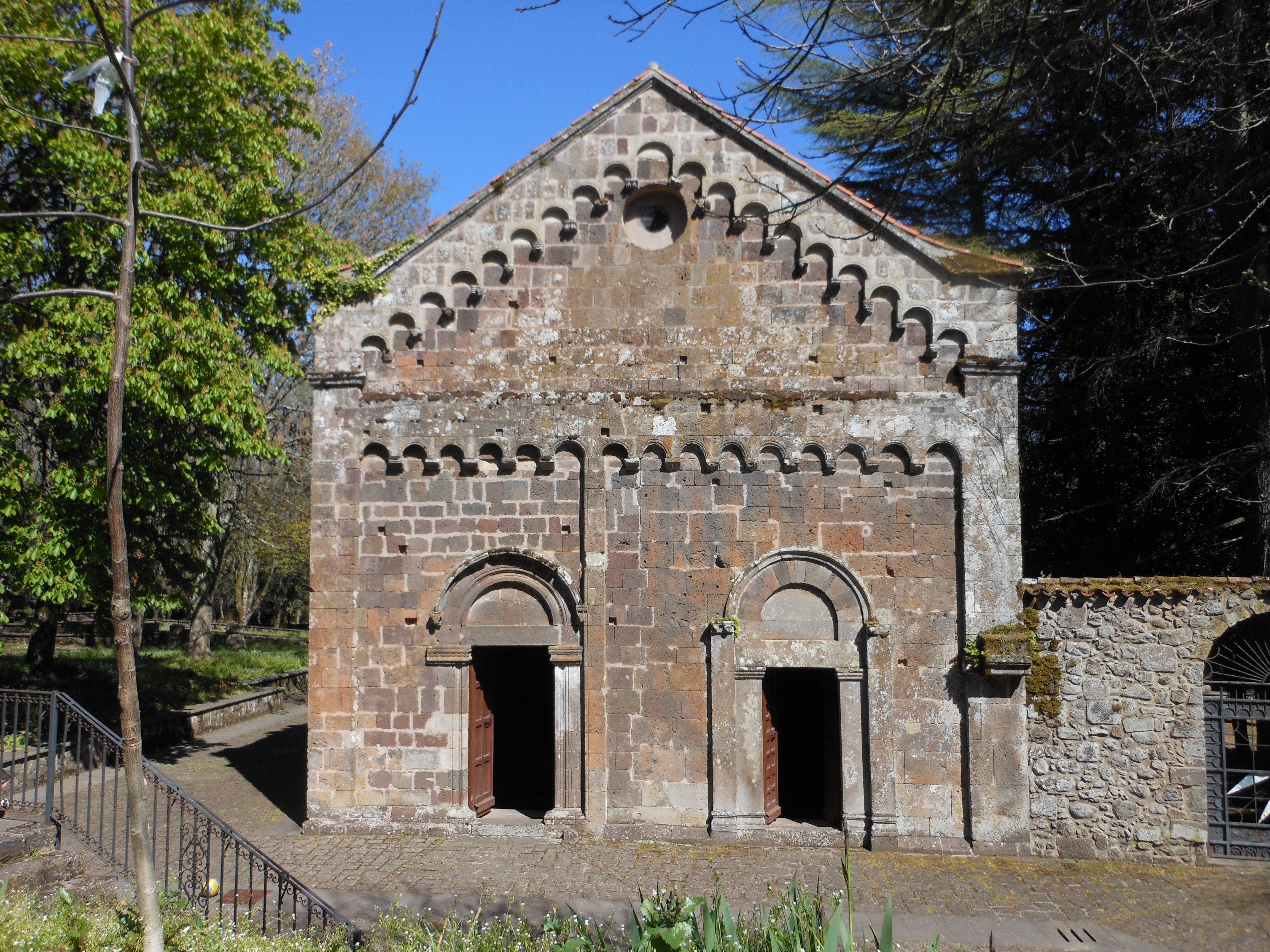 Santu Lussurgiu - San Leonardo di Siete Fuentes, Sardegna